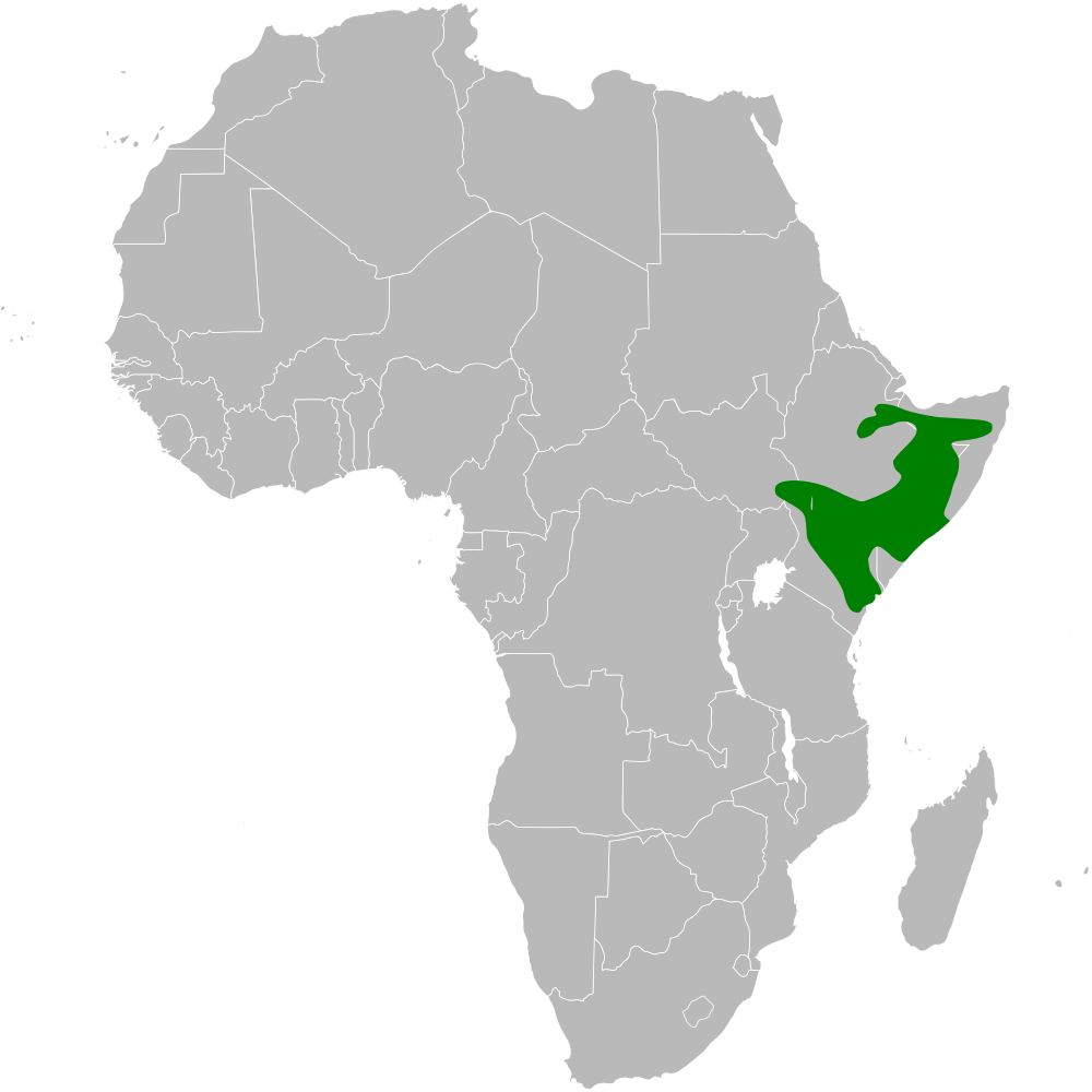 Eremopterix signata distribution map, based on